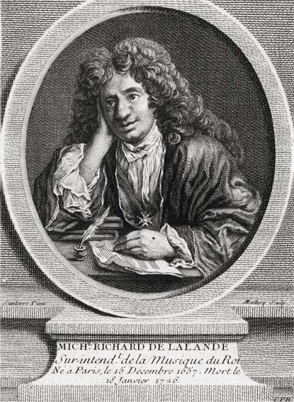 Michel-Richard de Lalande (1657-1726) d'après Santerre